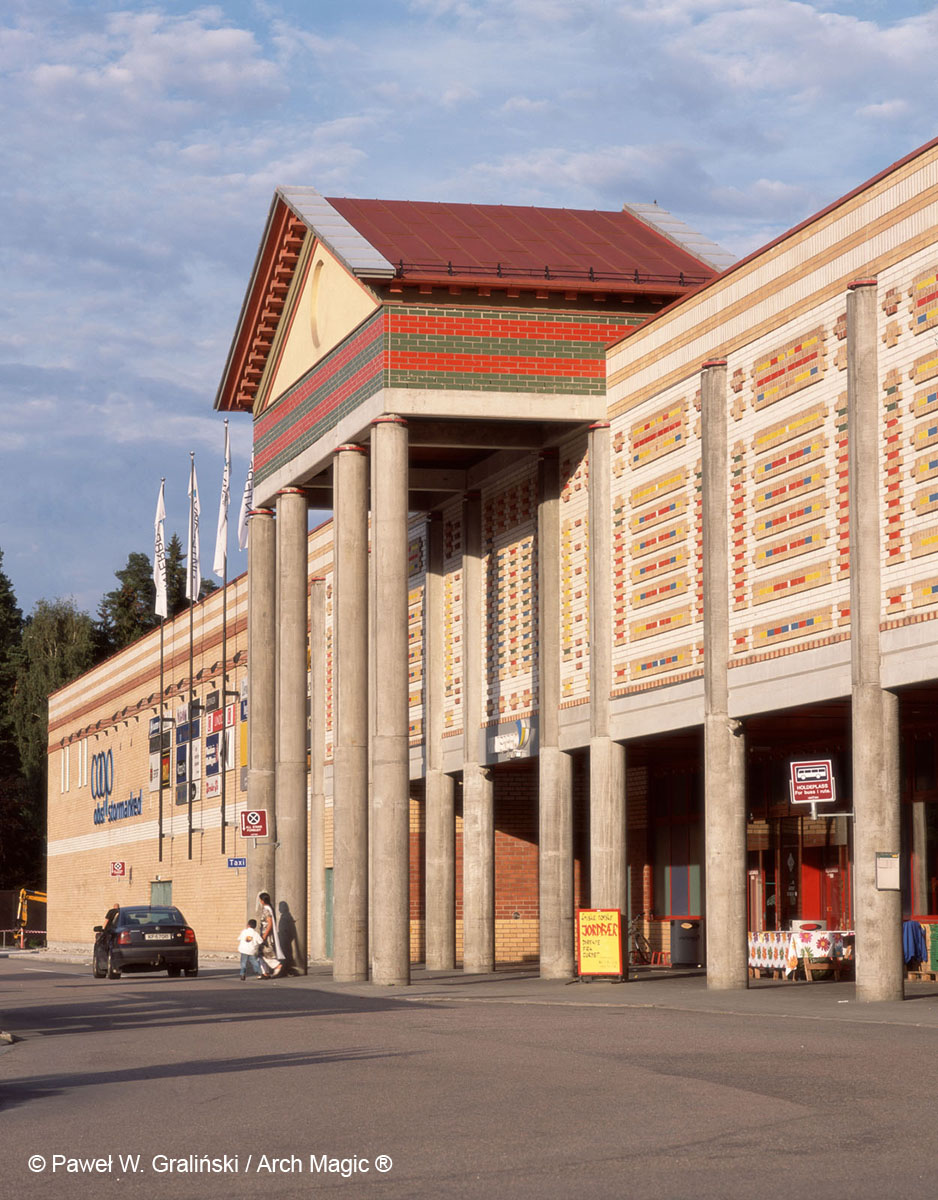 Centrum Handlowe Vinterbro w Norwegii